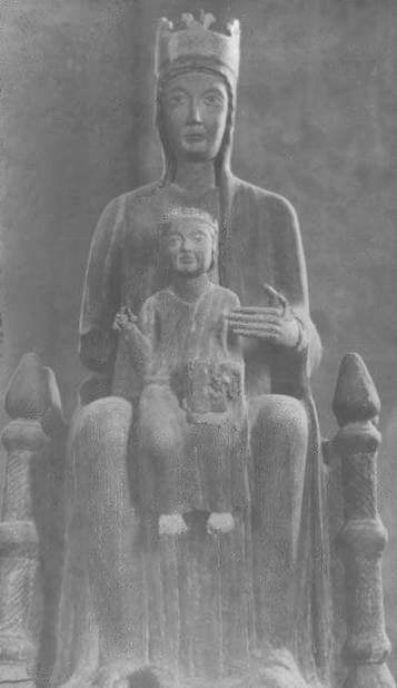 Imatge